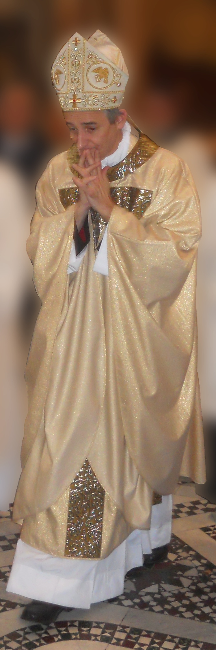 Il Vescovo Matteo Maria Zuppi